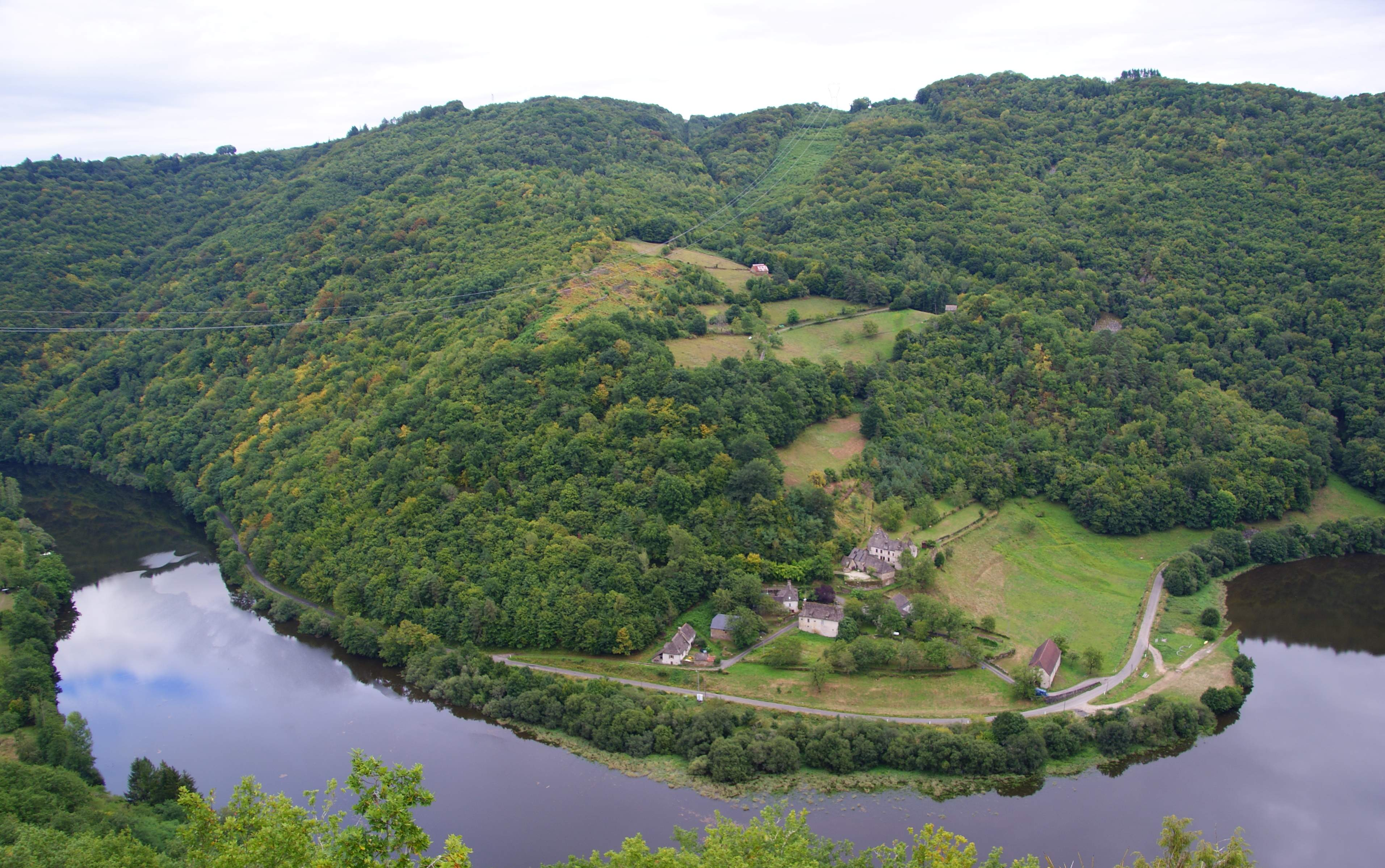 La Dordogne et le hameau de Grafeuille (commune de Hautefage) vus depuis le Roc Castel à Saint-Martial-Entraygues.